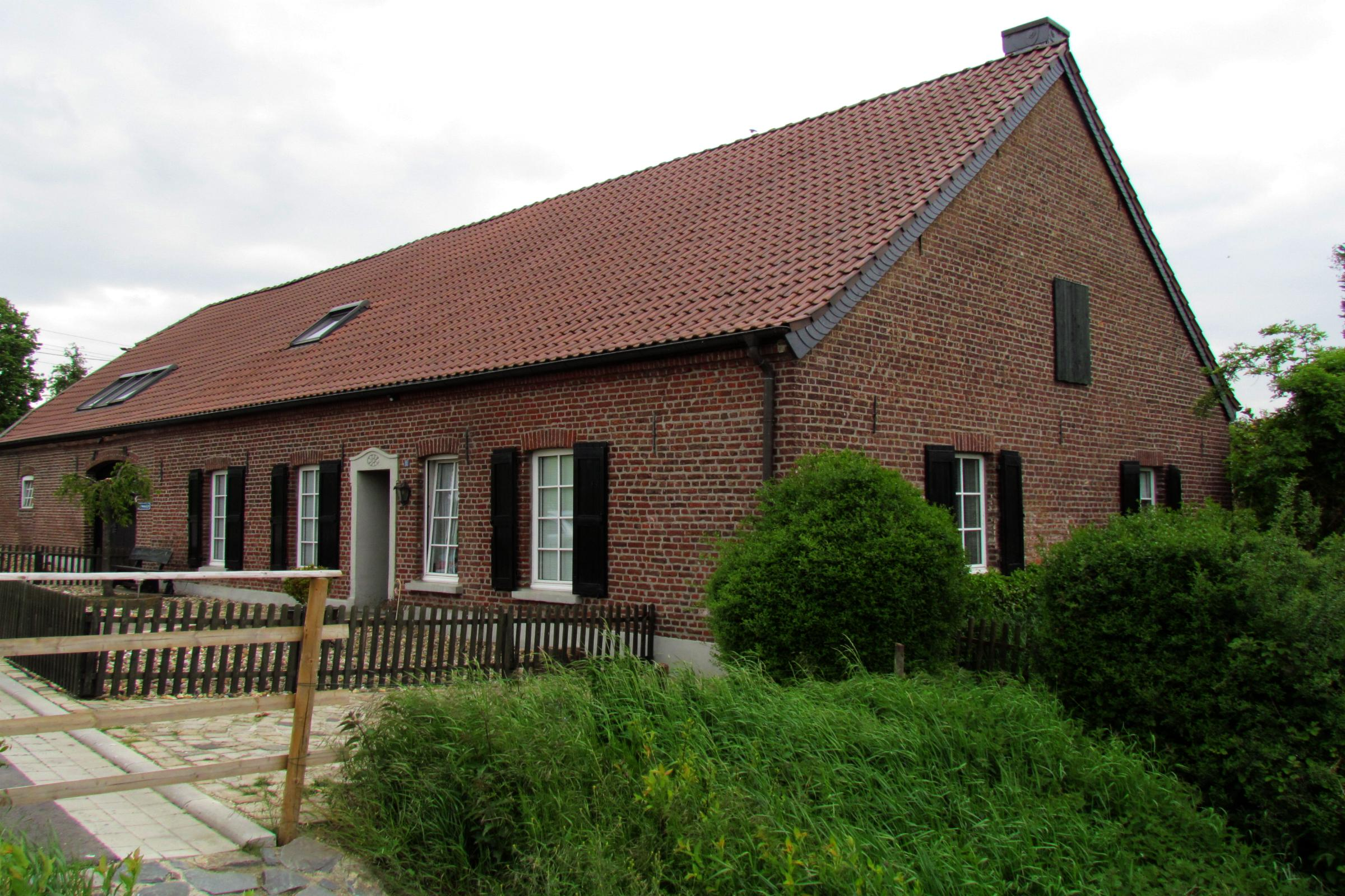 Die Kothmühle an der Nette in Wachtendonk